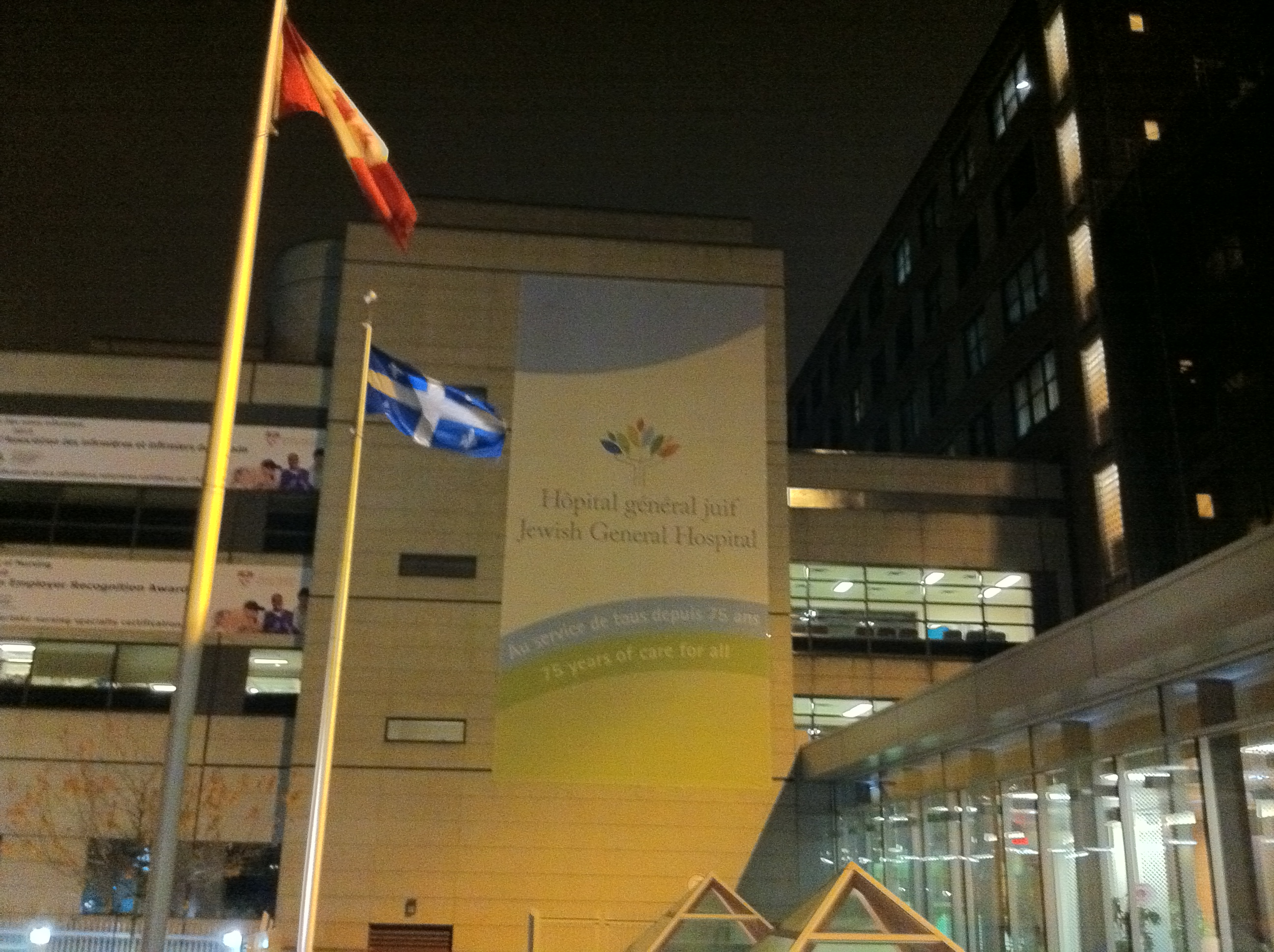 Jewish General Hospital